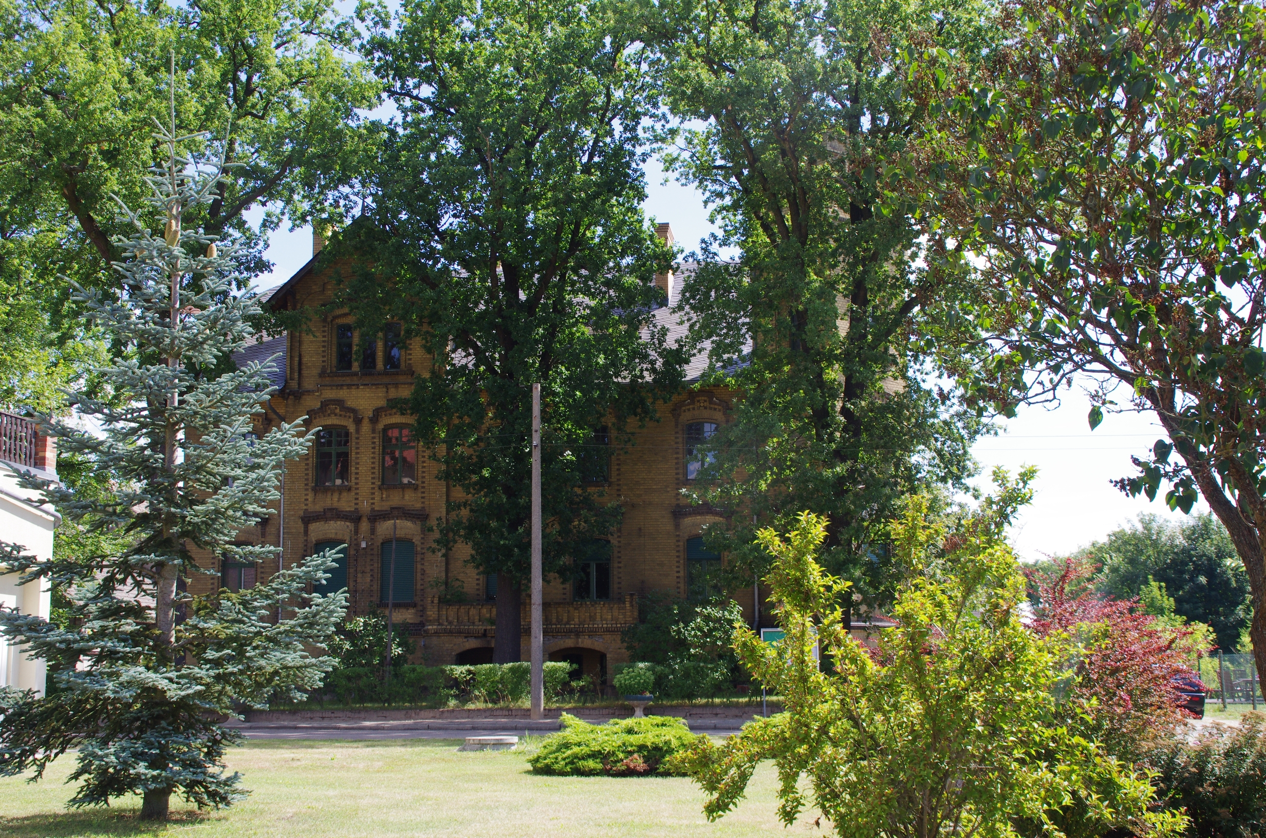 Niedergörsdorf in Brandenburg. Das Haus in der Dorfstraße 31 in Zellendorf steht unter Denkmalschutz.